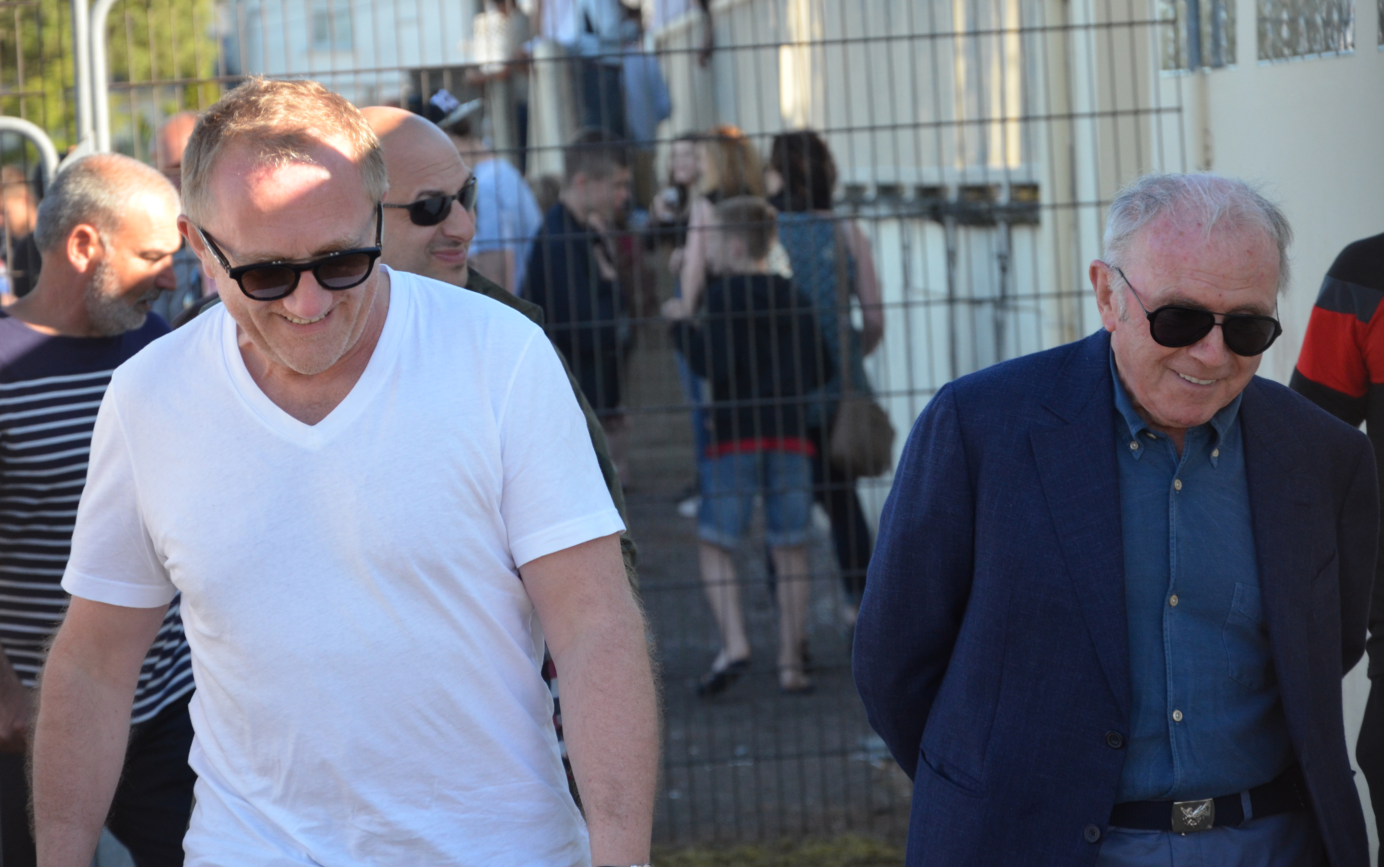 Photographie prise lors du match opposant le Stade rennais à l'USM Alger en match amical au stade Paul-Audrin de Dinard le 16 juillet 2016. Ici, François-Henri et François Pinault.